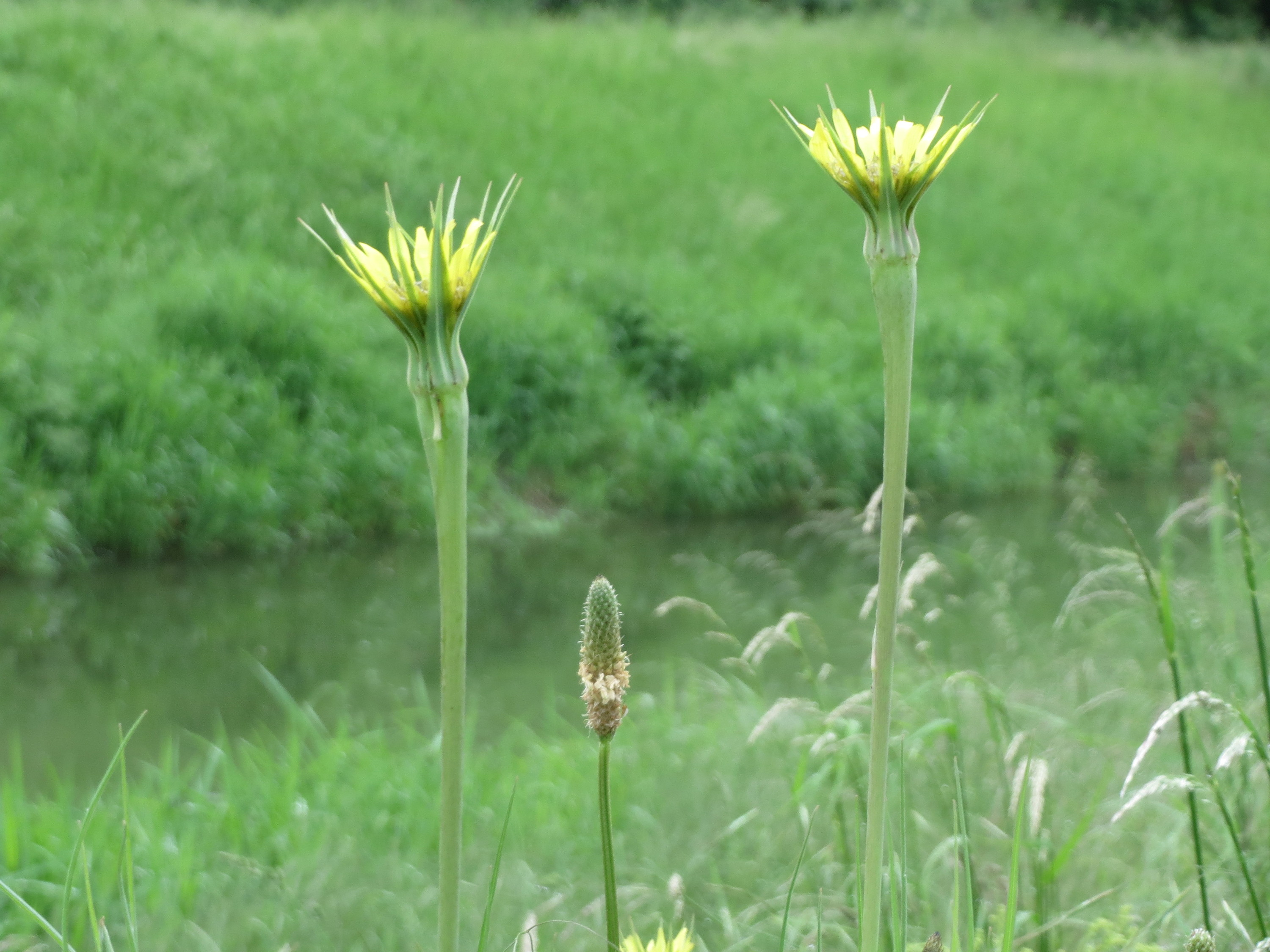 Großer Bocksbart (Tragopogon dubius) im Landschaftsschutzgebiet Hockenheimer Rheinbogen